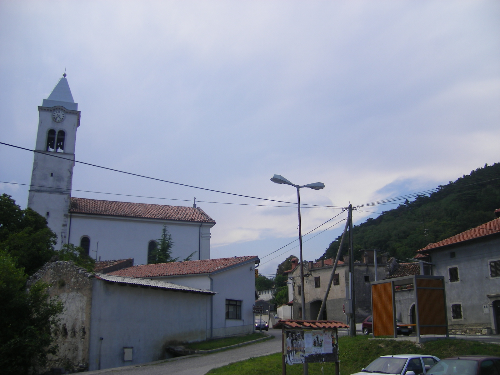 Črniče (Ajdovščina municipality)